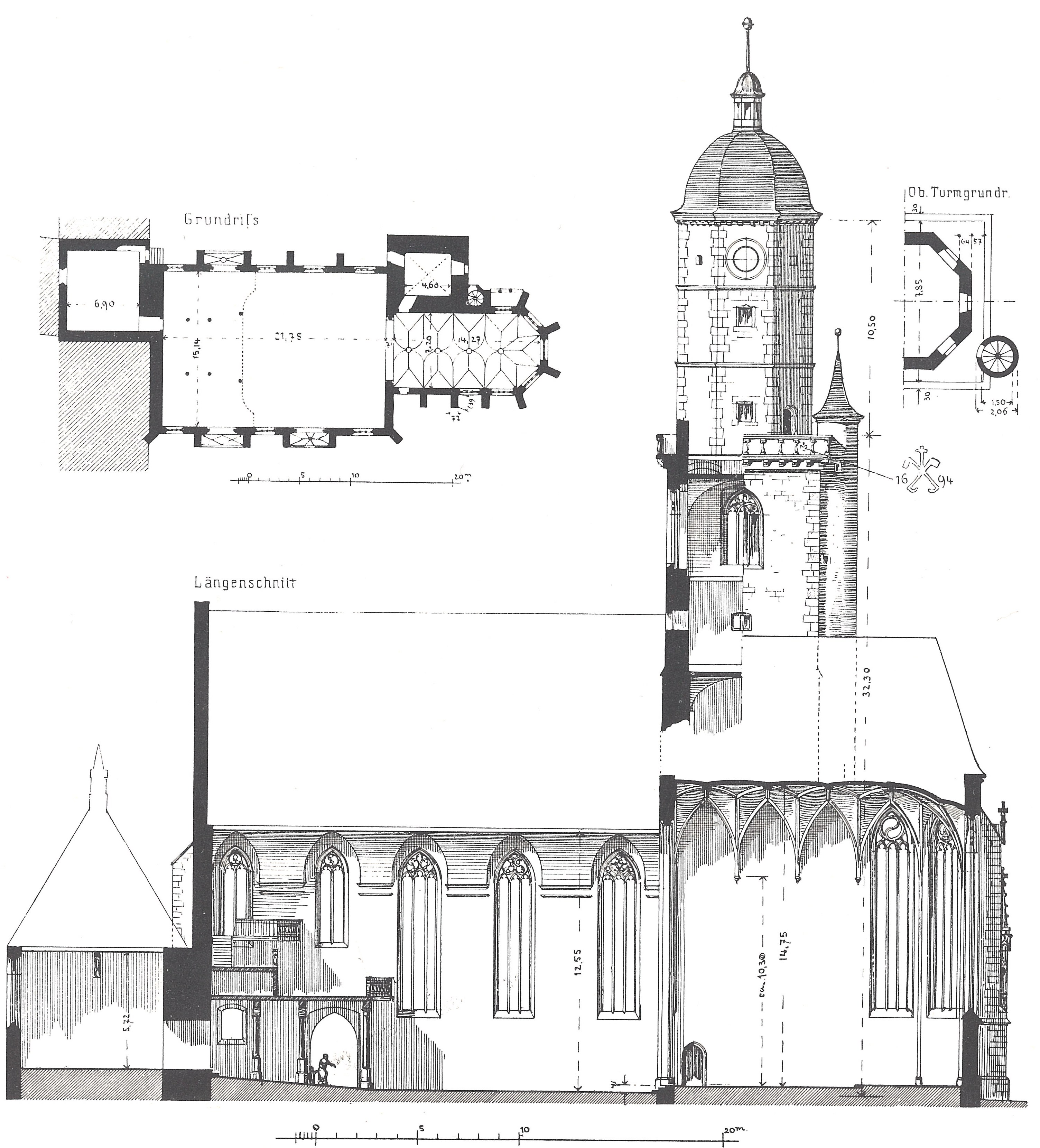 Karlinger, Hans: Die Kunstdenkmäler. S. 235.